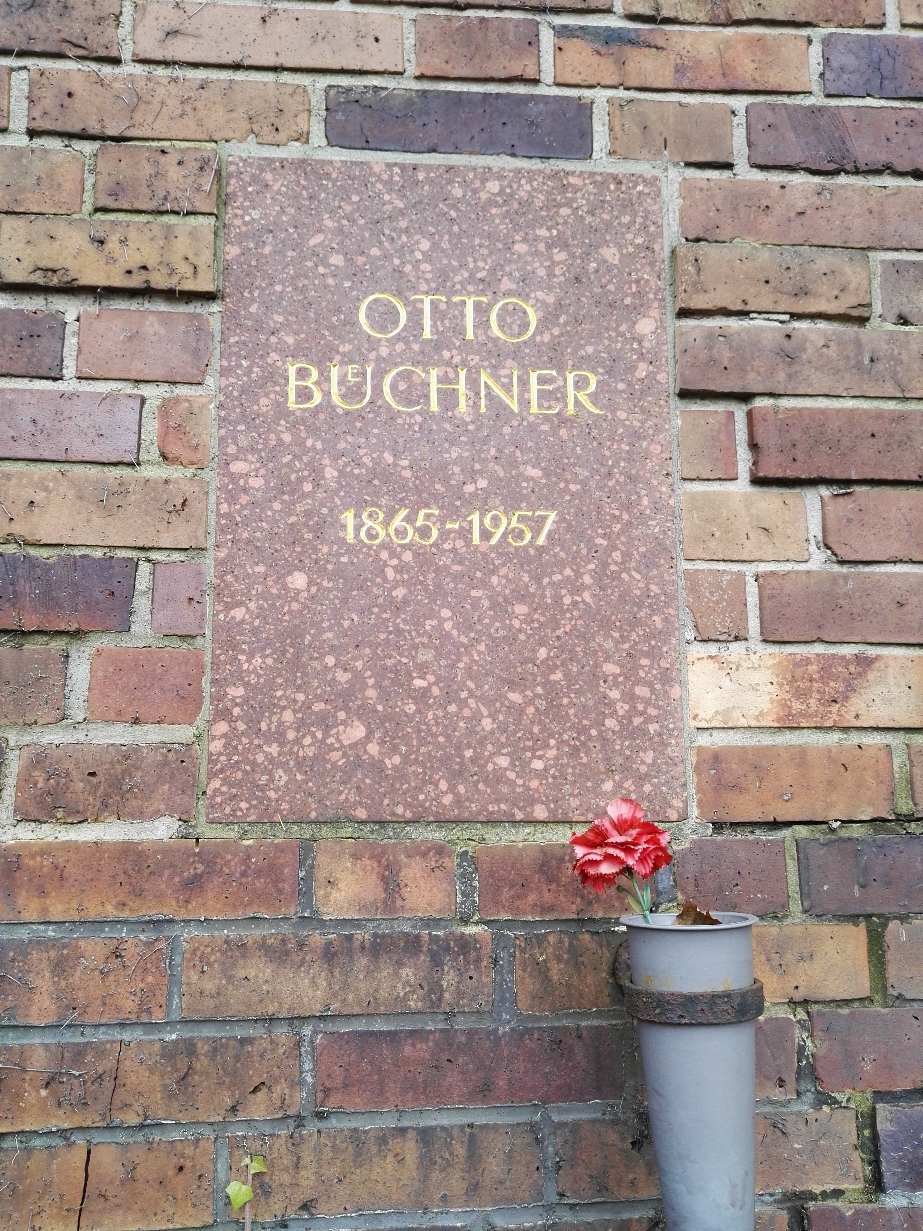 Grab von Otto Büchner in der Gedenkstätte der Sozialisten auf dem Zentralfriedhof Friedrichsfelde in Berlin-Lichtenberg